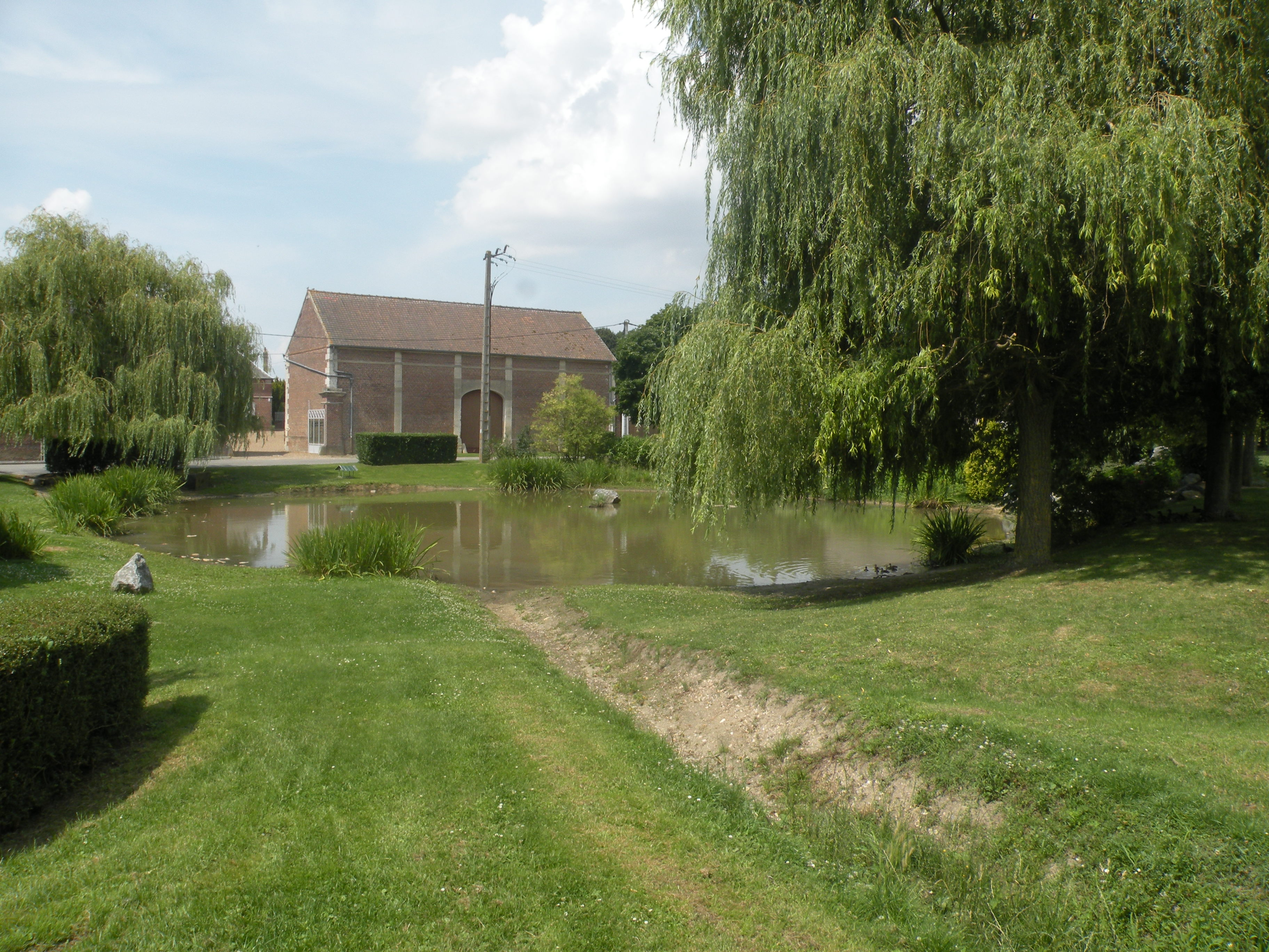 Le Fay-Saint-Quentin étang